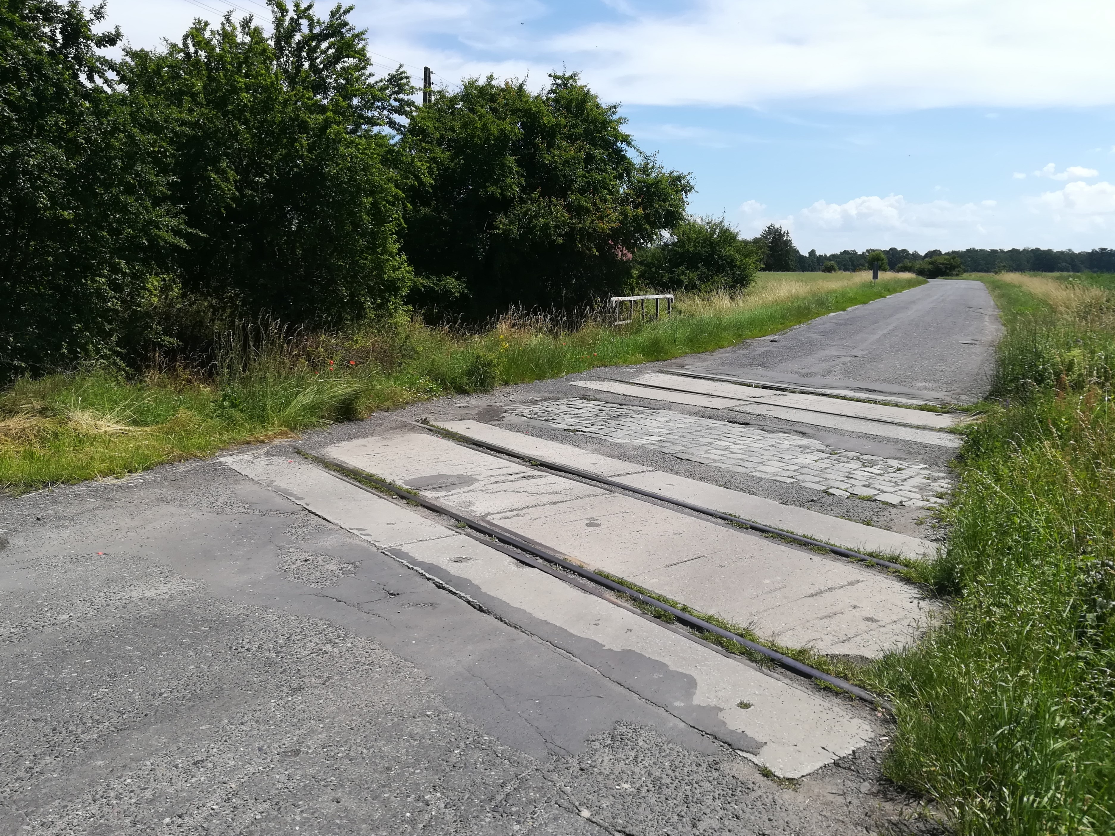 Dawna stacja kolejowa Bukowa Śląska. Widok w stronę Rychtala i Sycowa.